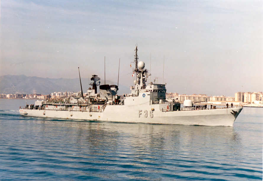 Corbeta Vencedora (F-36)